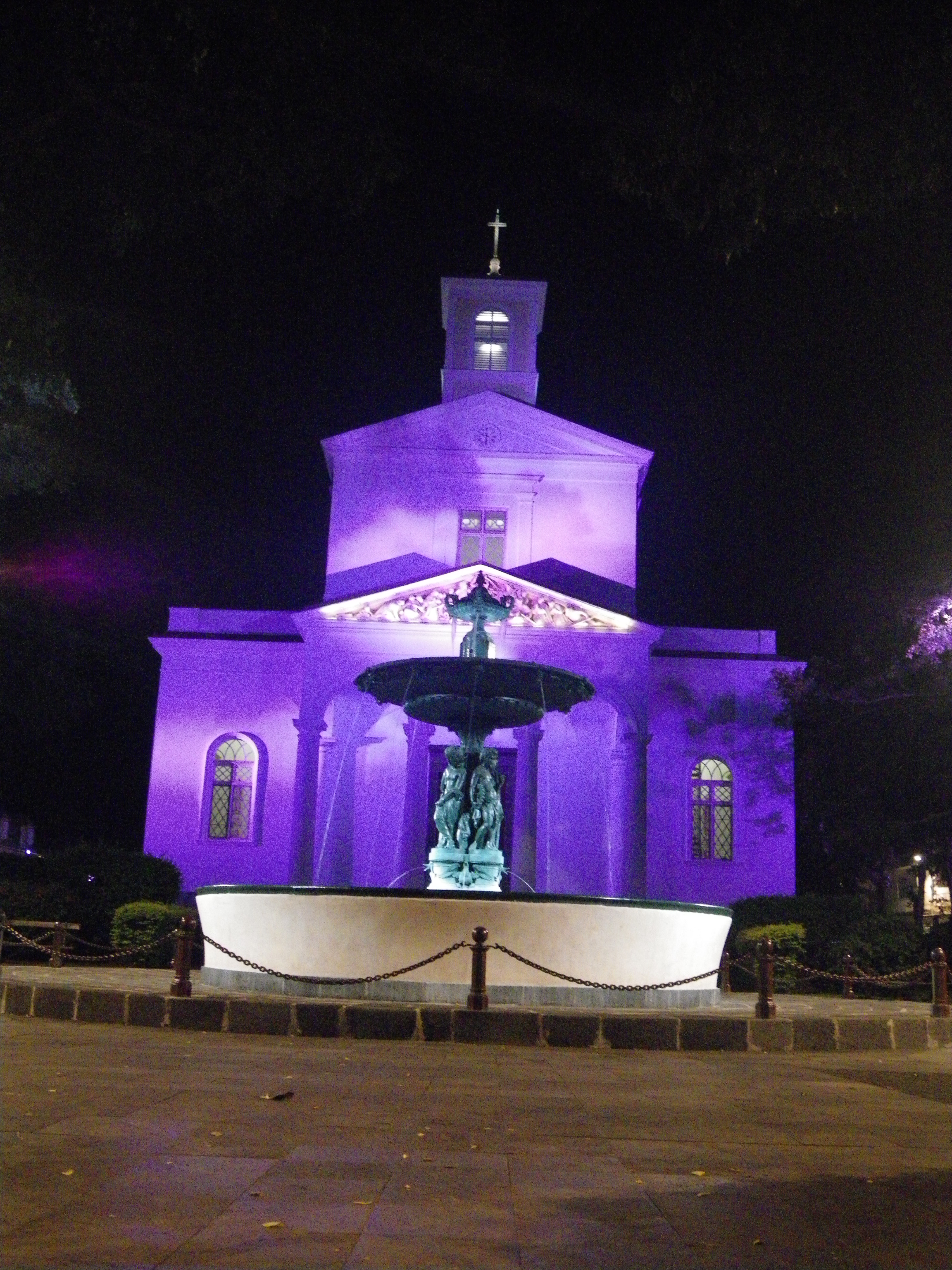 Cathédrale de Saint Denis de la Réunion de nuit .